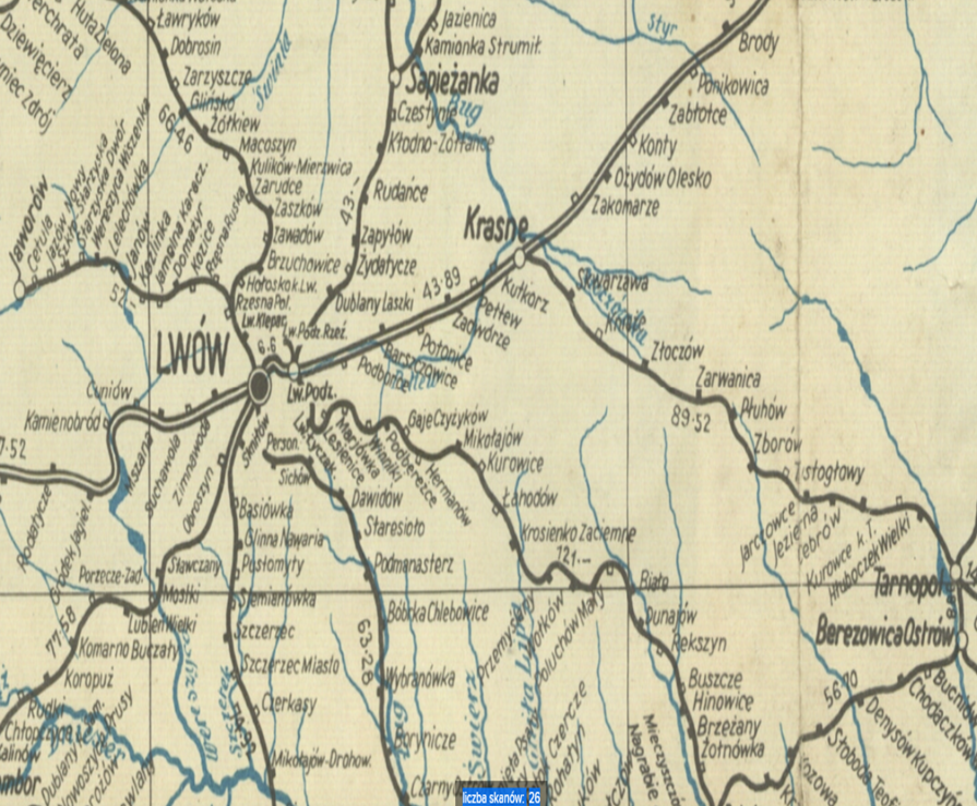 схема залізниці Польщі 1938.Залізниця до Перемишлян